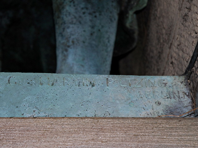 Gießereimarke der Berliner Bronce- und Zinkgießerei Martin & Piltzing auf der Plinthe des 1909 gefertigten Freiherr-vom-und-zum-Stein-Denkmals am Rathaus Wetter, Wetter (Ruhr)